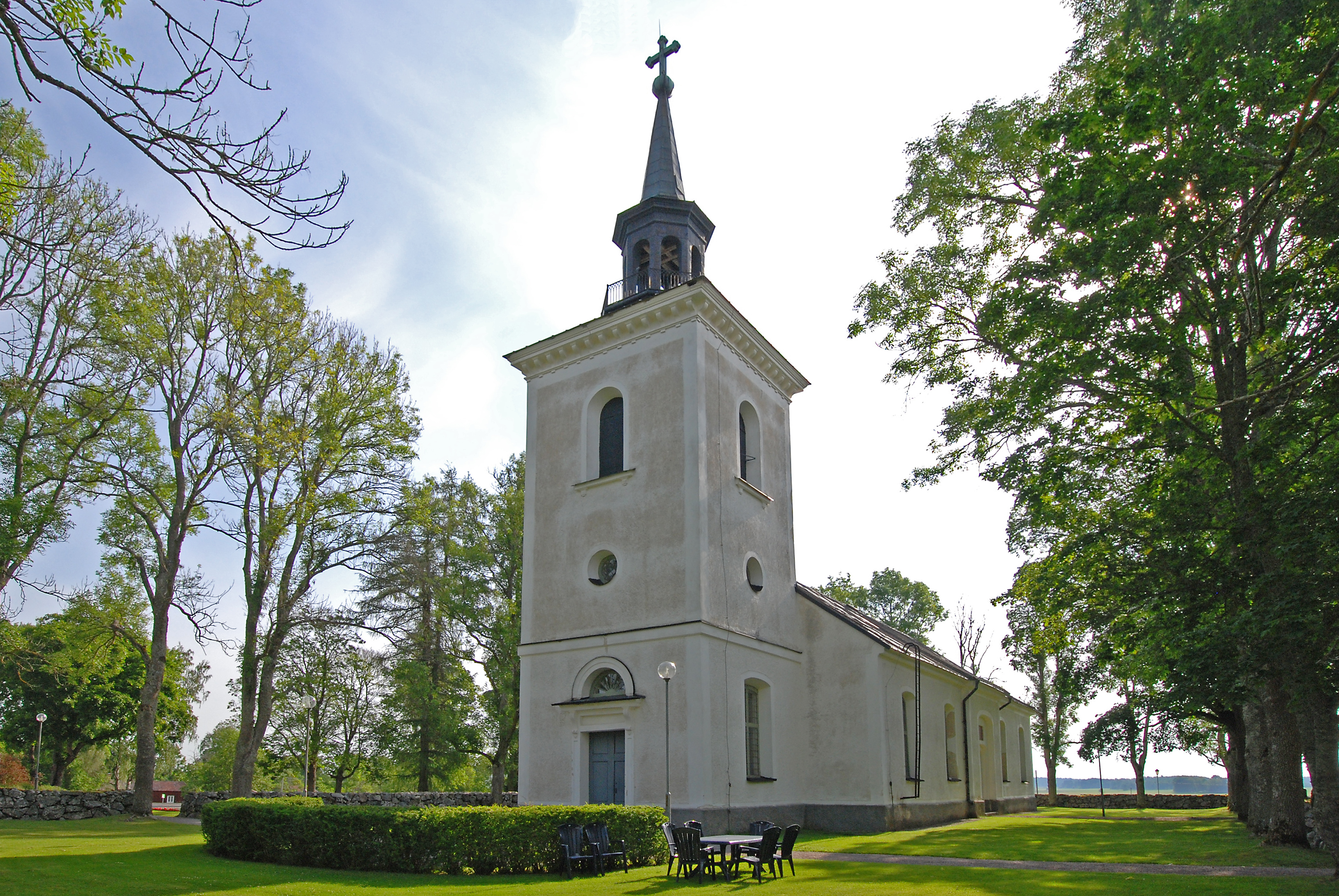 Stenkvista kyrka